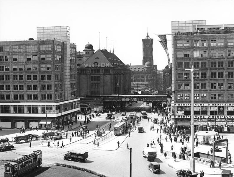 Berlin; Alexanderplatz